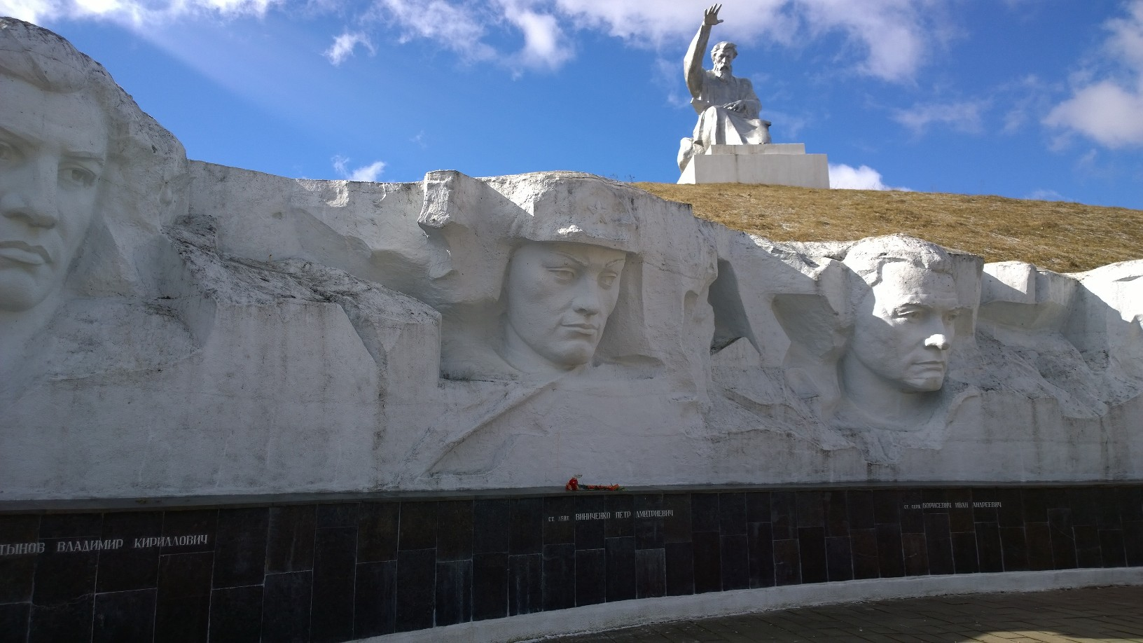 Барельеф Героя Советского Союза Петра Дмитриевича Виниченко на Кургане Славы «Лудчицкая высота» (поселок Лудчицы, Быховский район Могилёвской области).